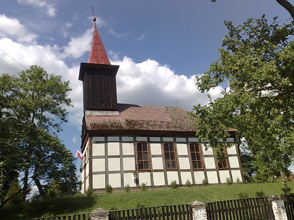 Kościół w Rynicy